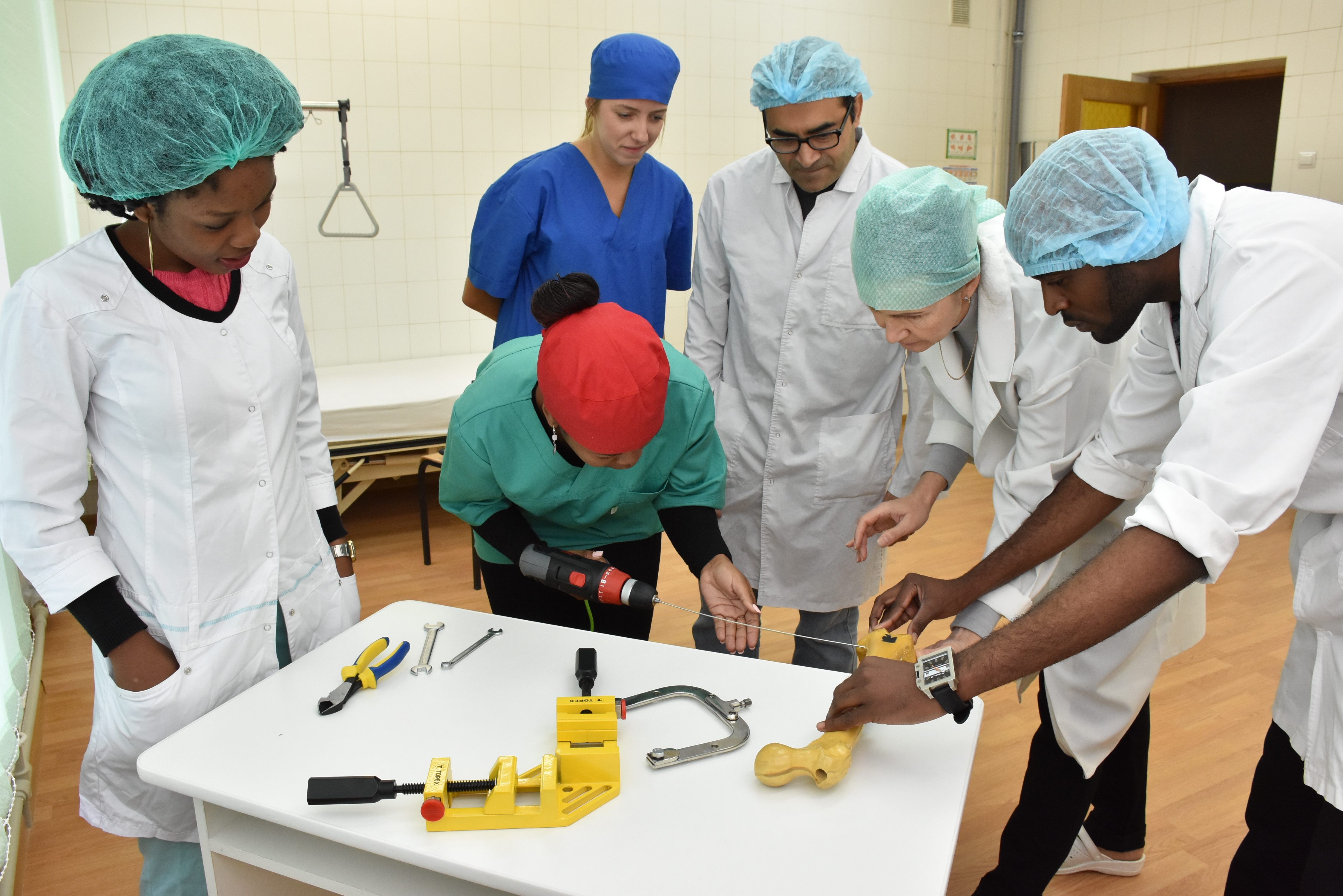 Іноземні студенти на заняттях у центрі симуляційного навчання Тернопільського державного медичного університету імені І. Я. Горбачевського.